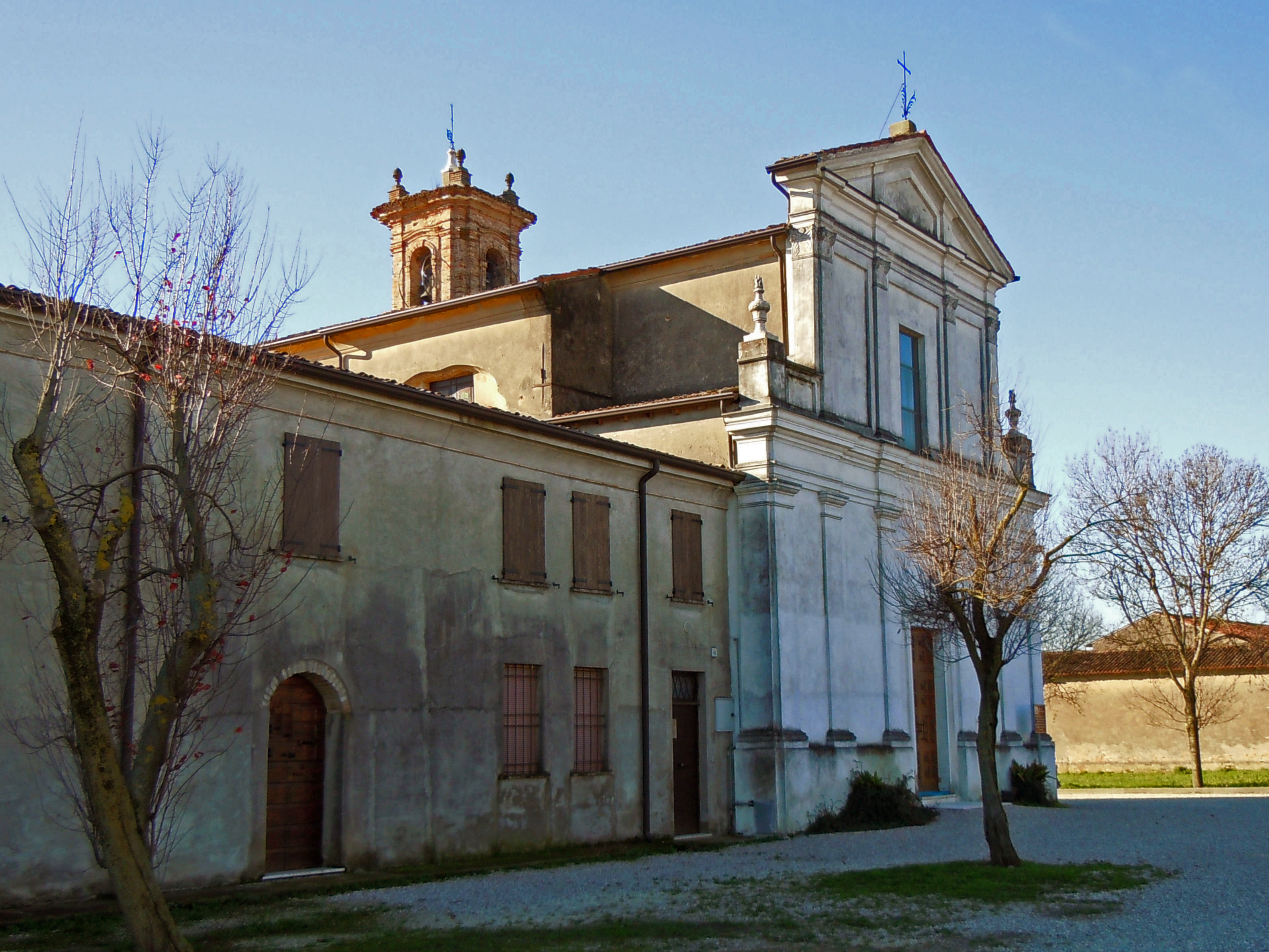 Castel Goffredo, frazione Bocchere. chiesa di Santa Margherita.